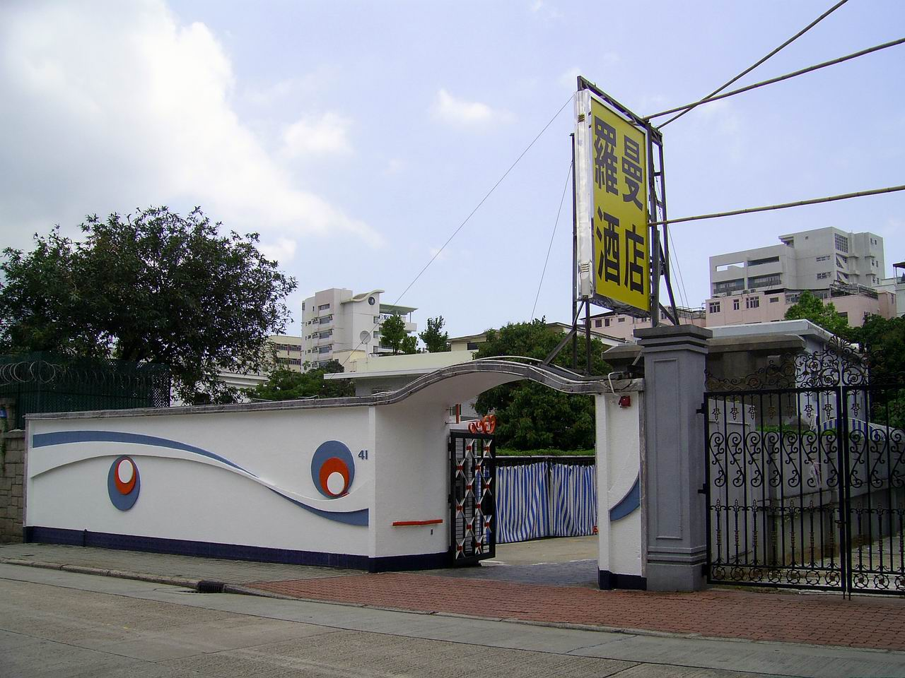 李小龍位於九龍塘的故居，現為羅曼酒店